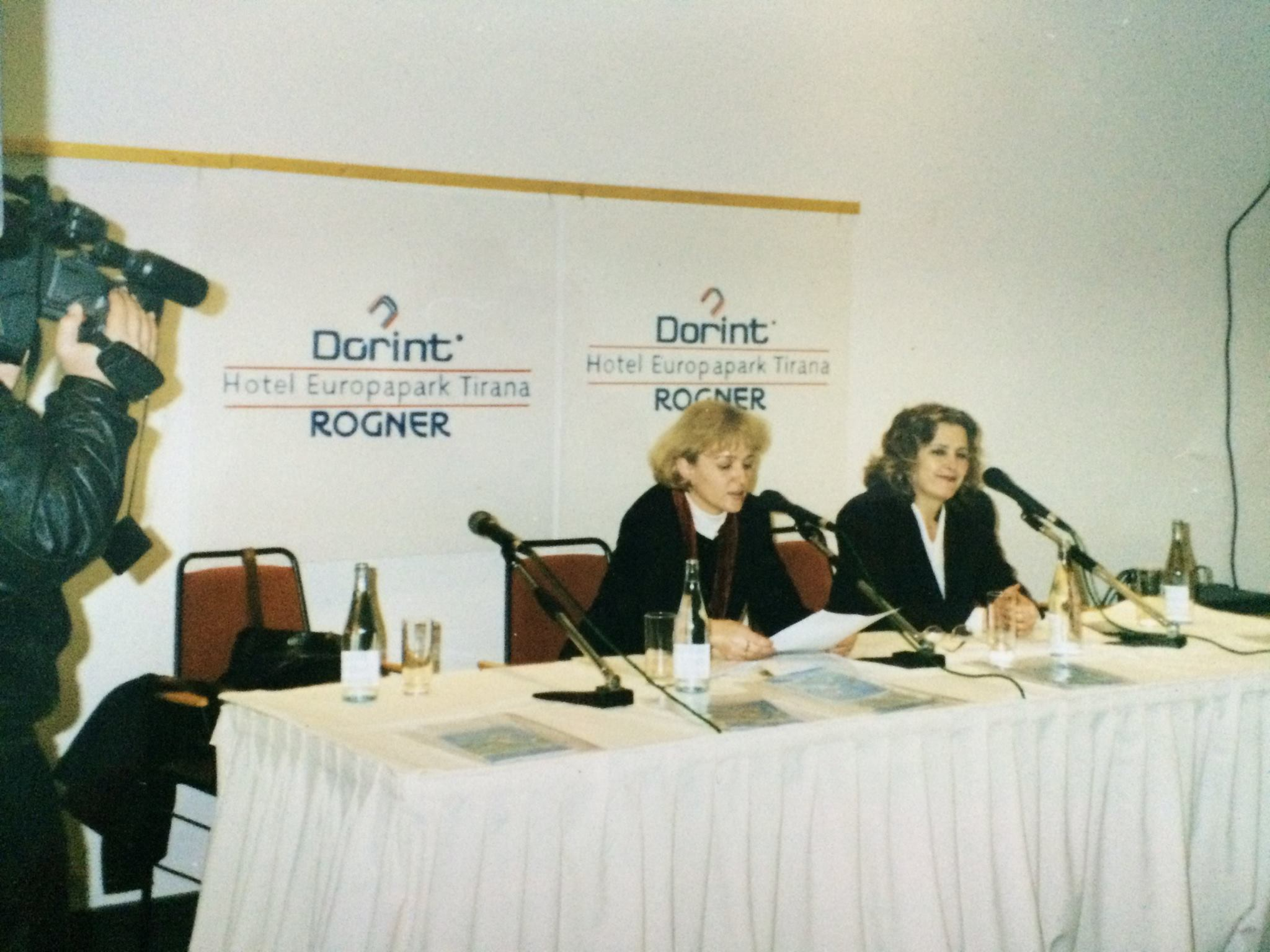 Pernaska ne Lancimin e Ligjit per Baratine Gjinore ne Shoqeri (2004)